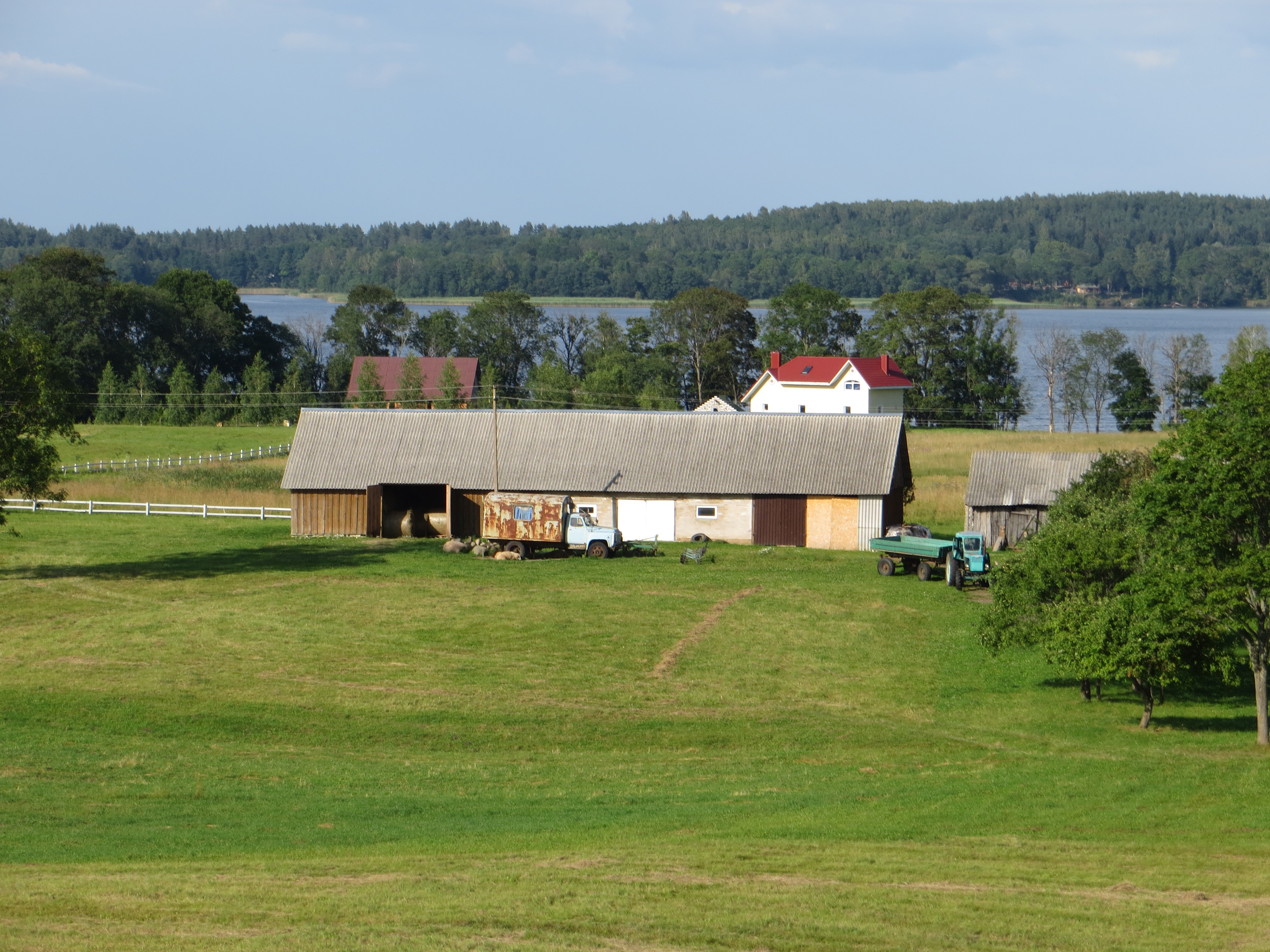 Sudeikių sen., Lithuania